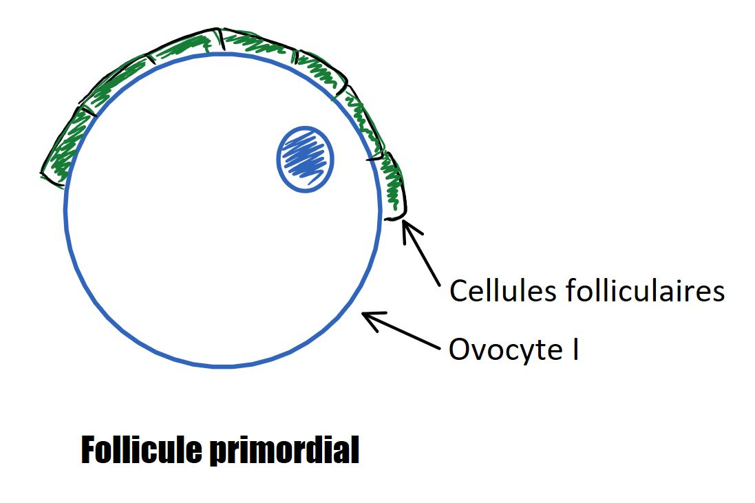 Follicule primordial avec ovocyte, cellules folliculaires. Par J. GOY-MARTIN